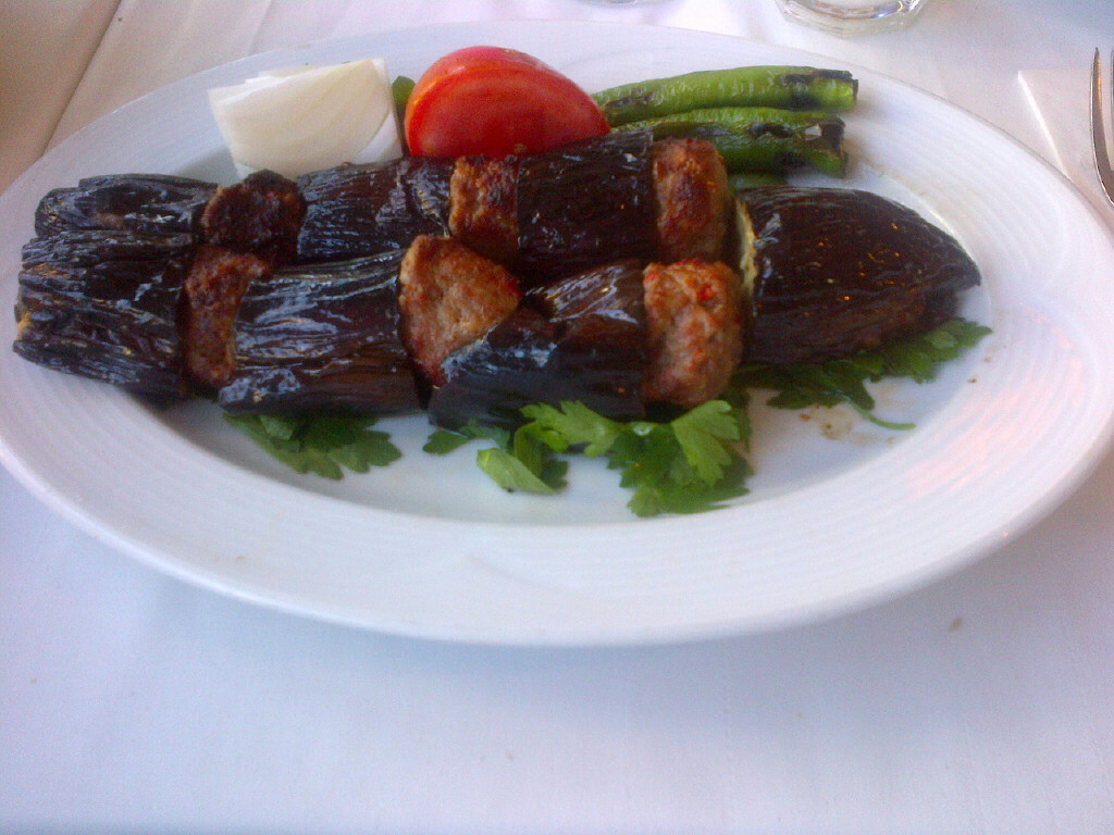 "Patlıcanlı kebap" (Kebab con berenjenas) de la cocina del sur de Turquia